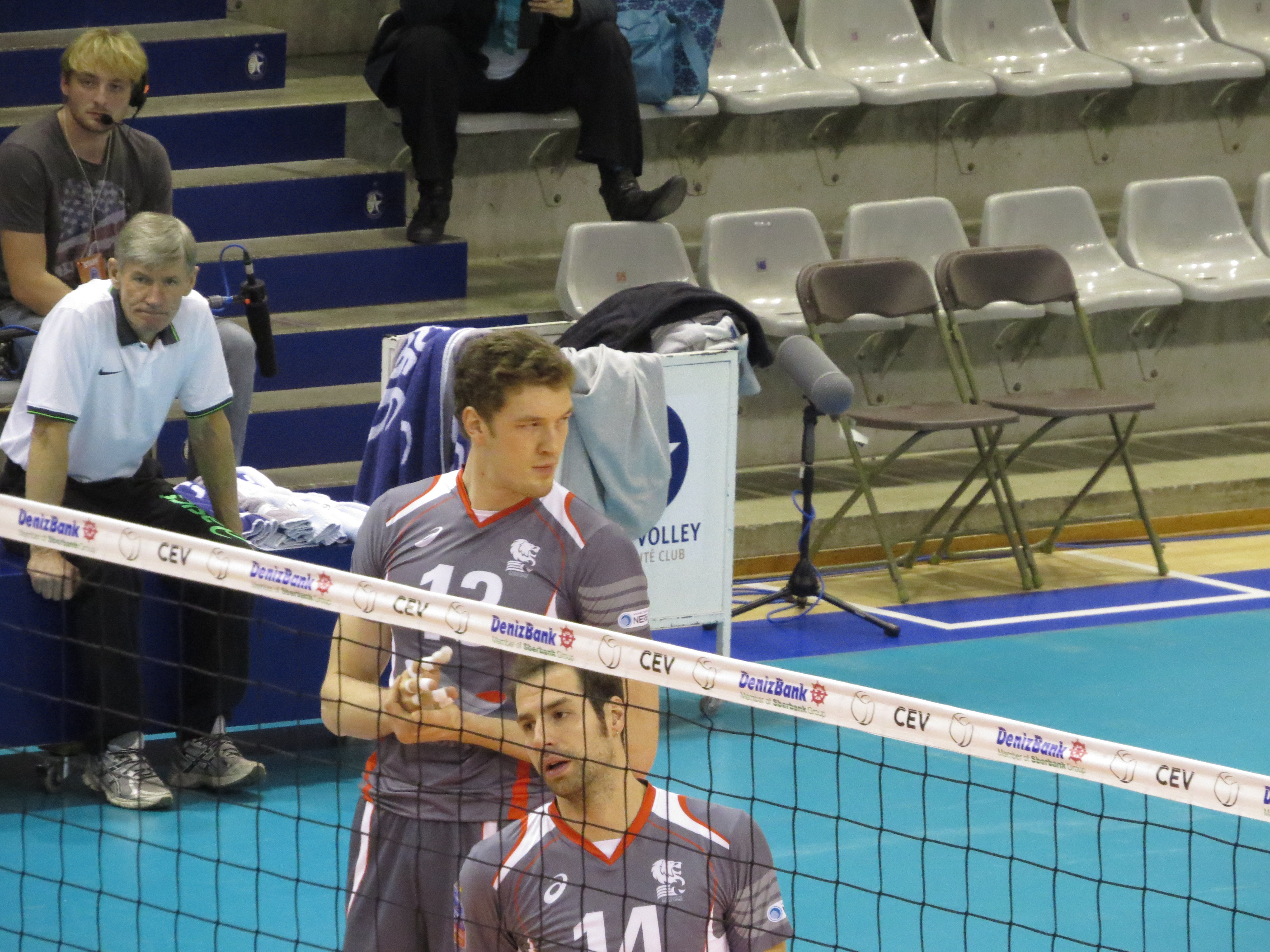 Photo réalisée lors du match de ligue des champions de volley entre le Paris Volley et le Lokomotiv Belgorod. Victoire de Belgorod 3-0 13:MUSERSKIY Dmitriy 14:Dragan Travica